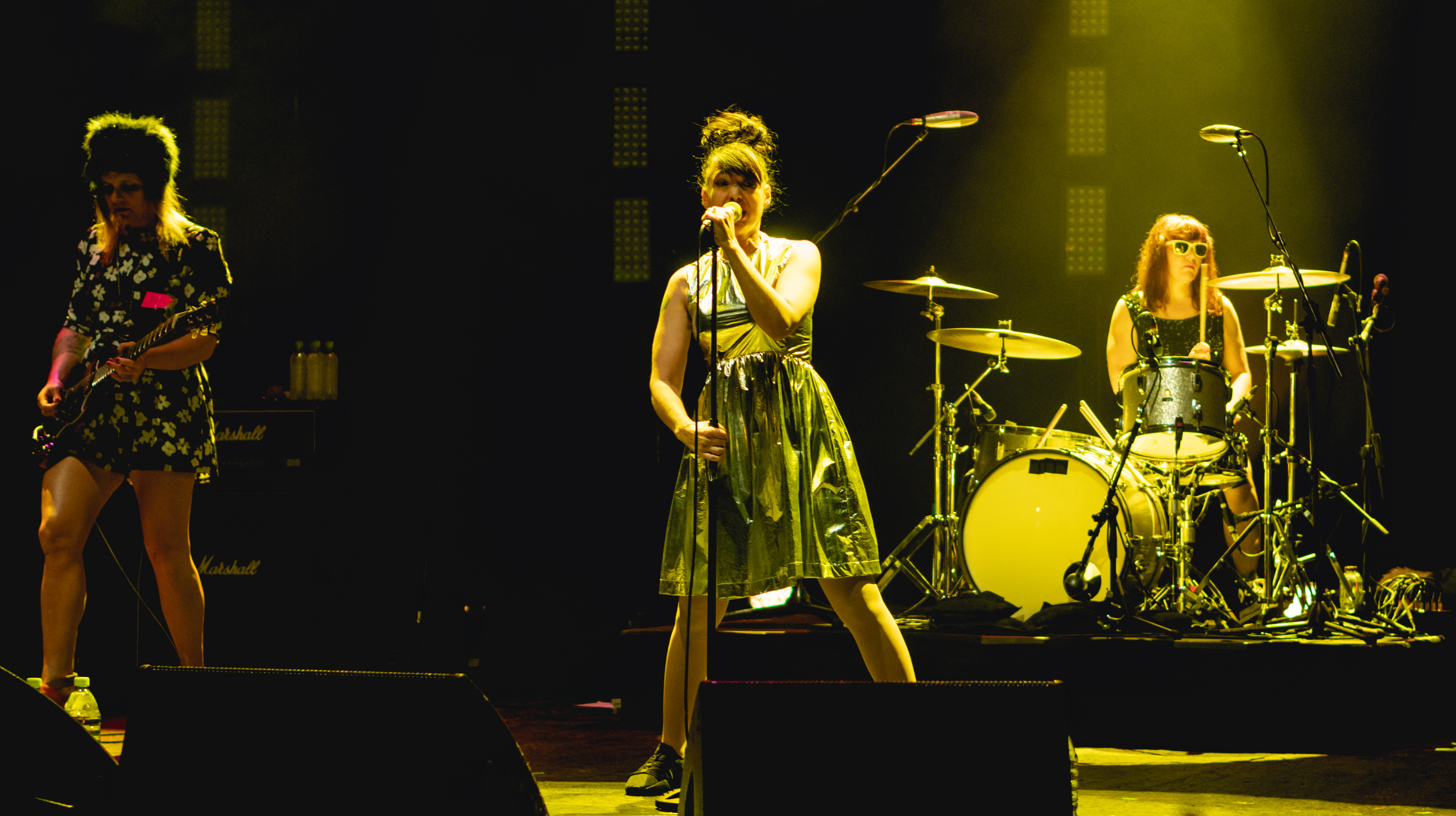 BikiniKBrixt110619-5